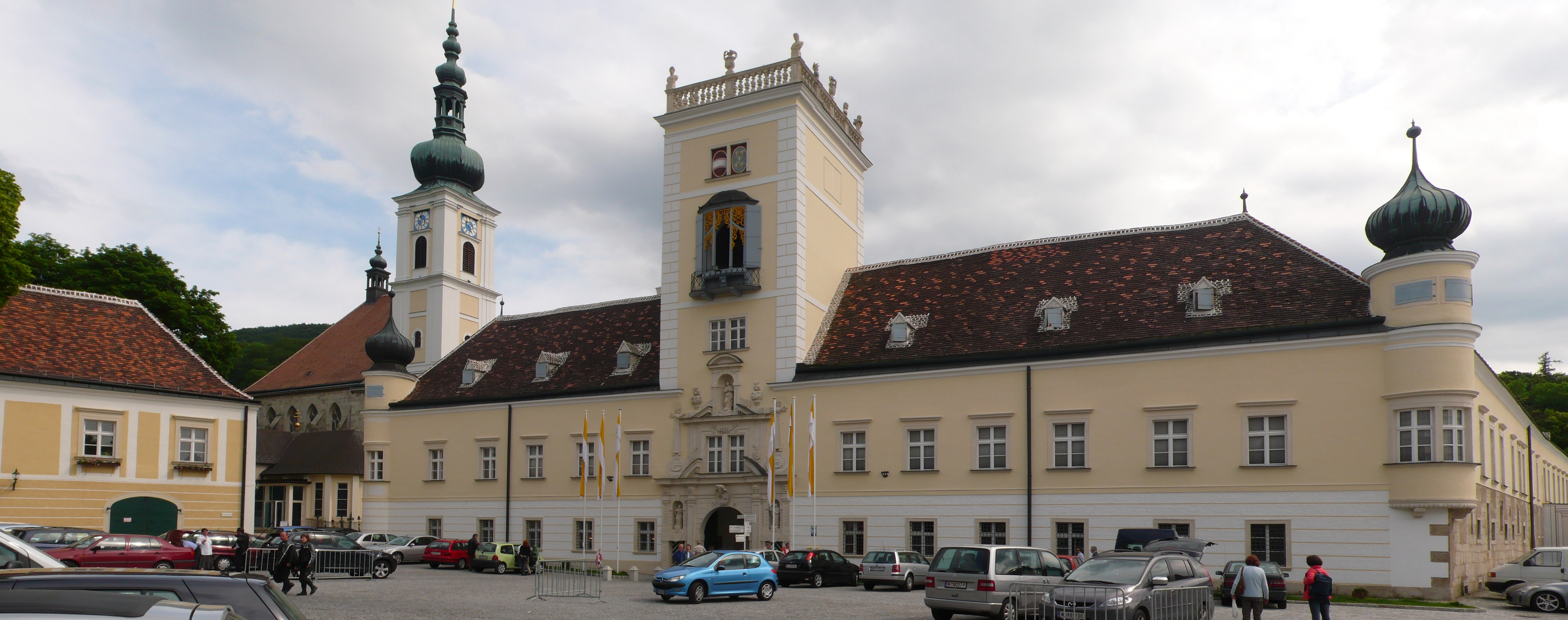 Stift Heiligenkreuz, Niederösterreich (Panorama)